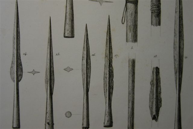 Bladdannede spydspidser